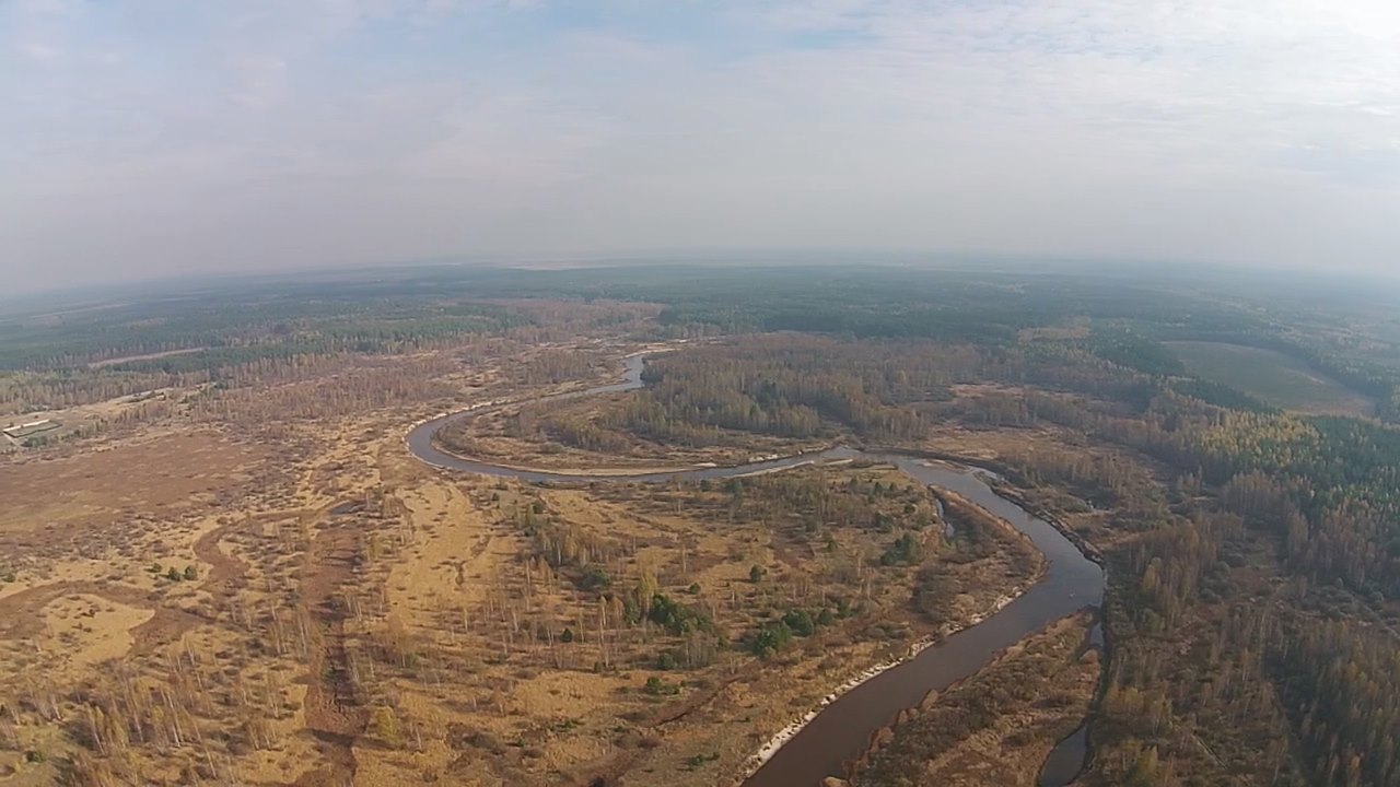 Река Пра в Мещерских лесах